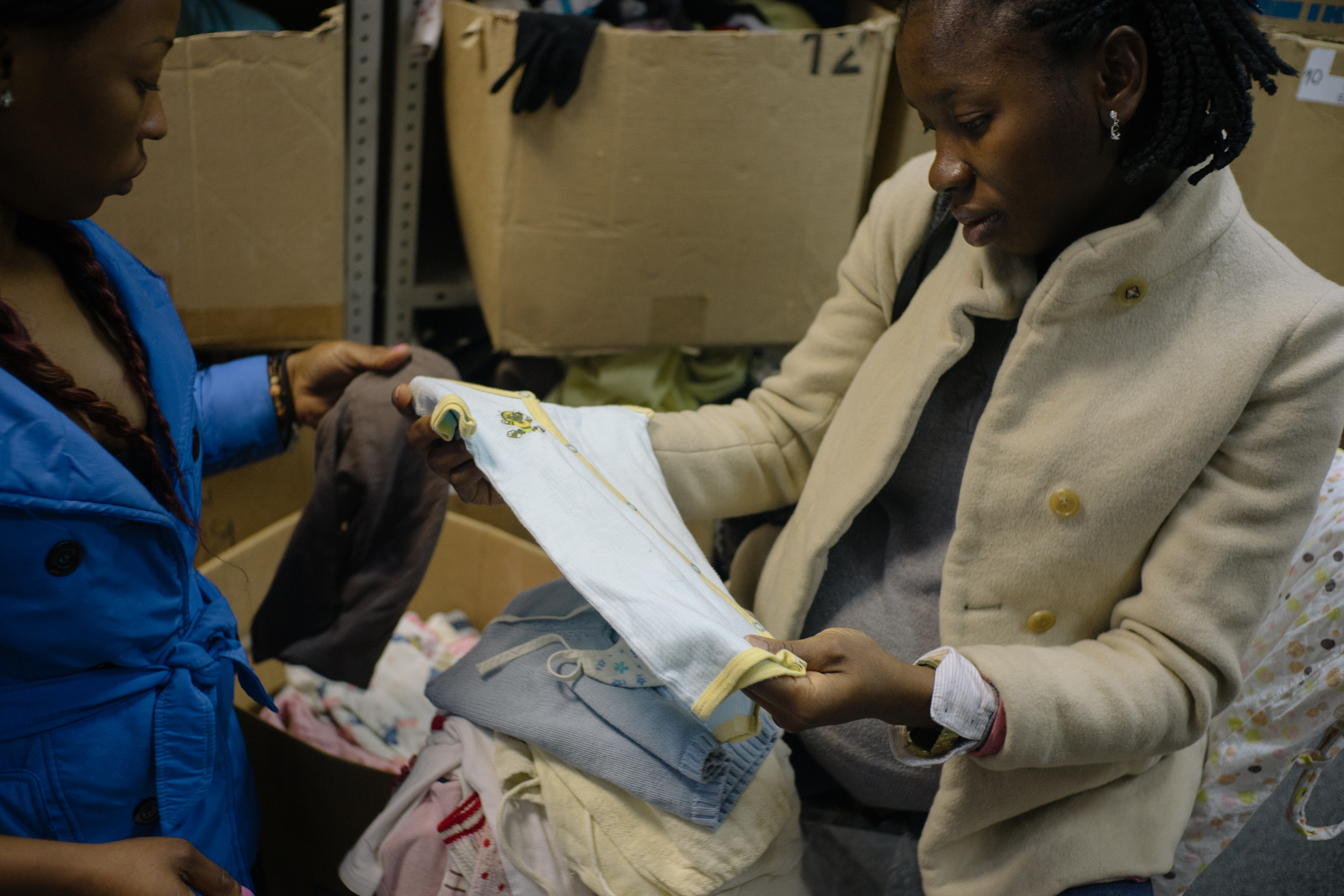 Комитет собирает у москвичей и раздает беженцам одежду, обувь и предметы обихода